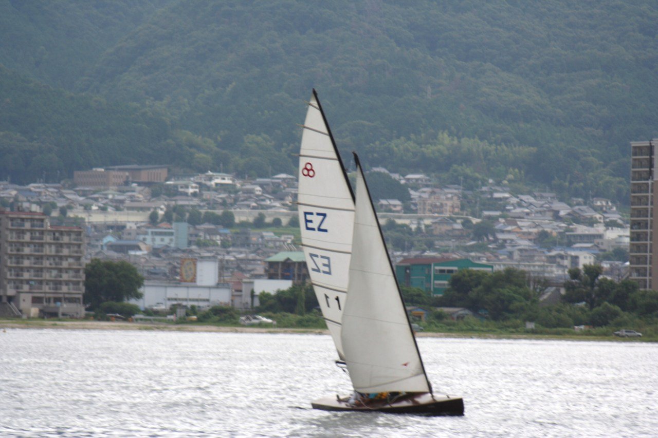 Einheitszehner